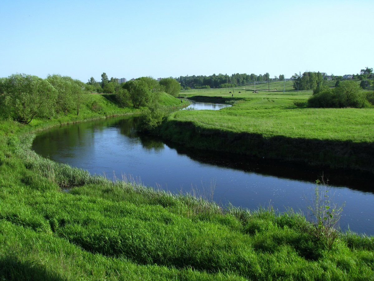 Река Оршица синей лентой вьётся. River Orshitsa blue ribbon curls.